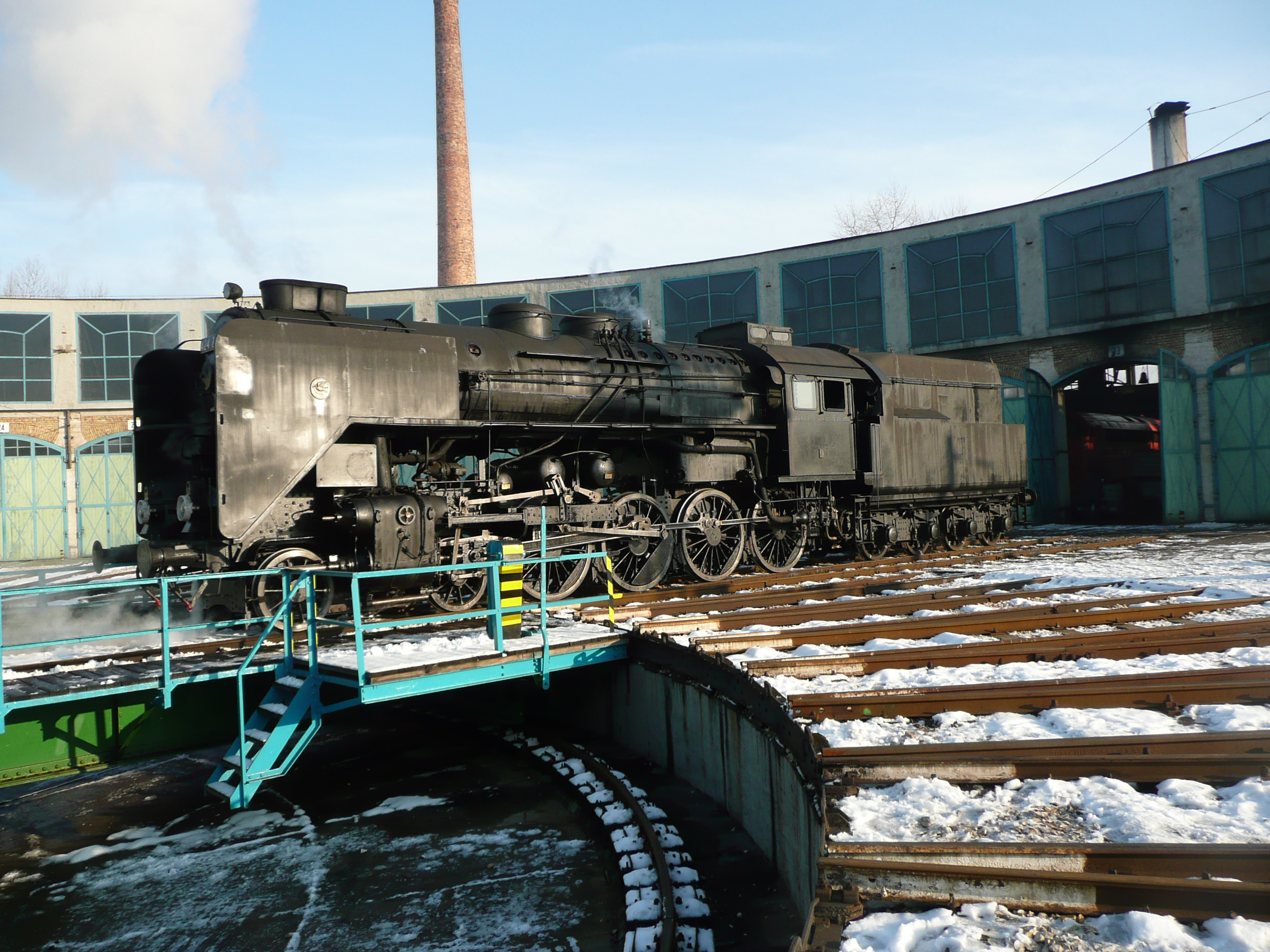 424.247 vor dem Lokschuppen des Bahnpark Budapest